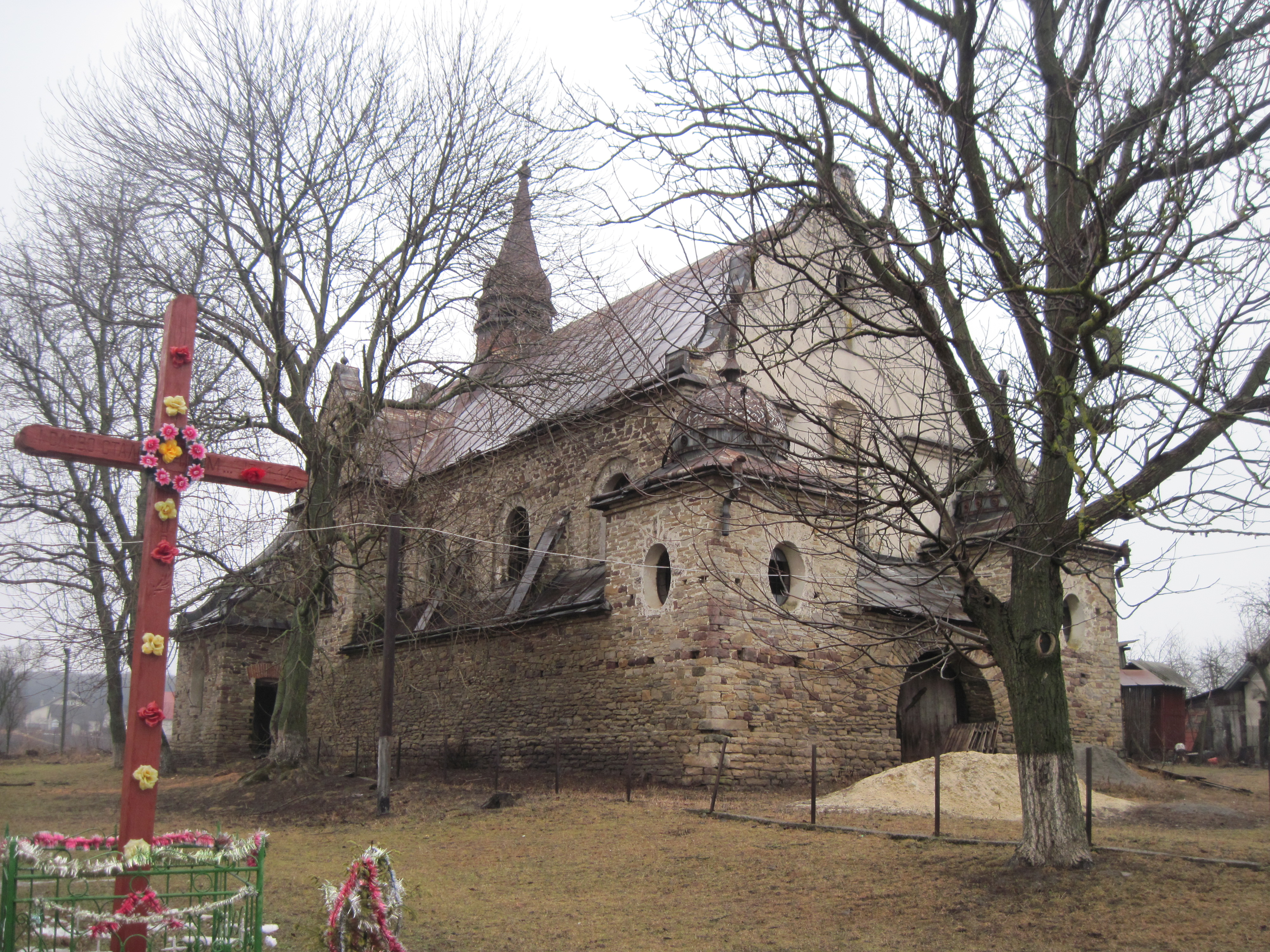 Костел у с. Звенигороді поблизу Бучача (автор проєкту — Францішек Ян фон Пучьоґль (Пшевірский), 2015